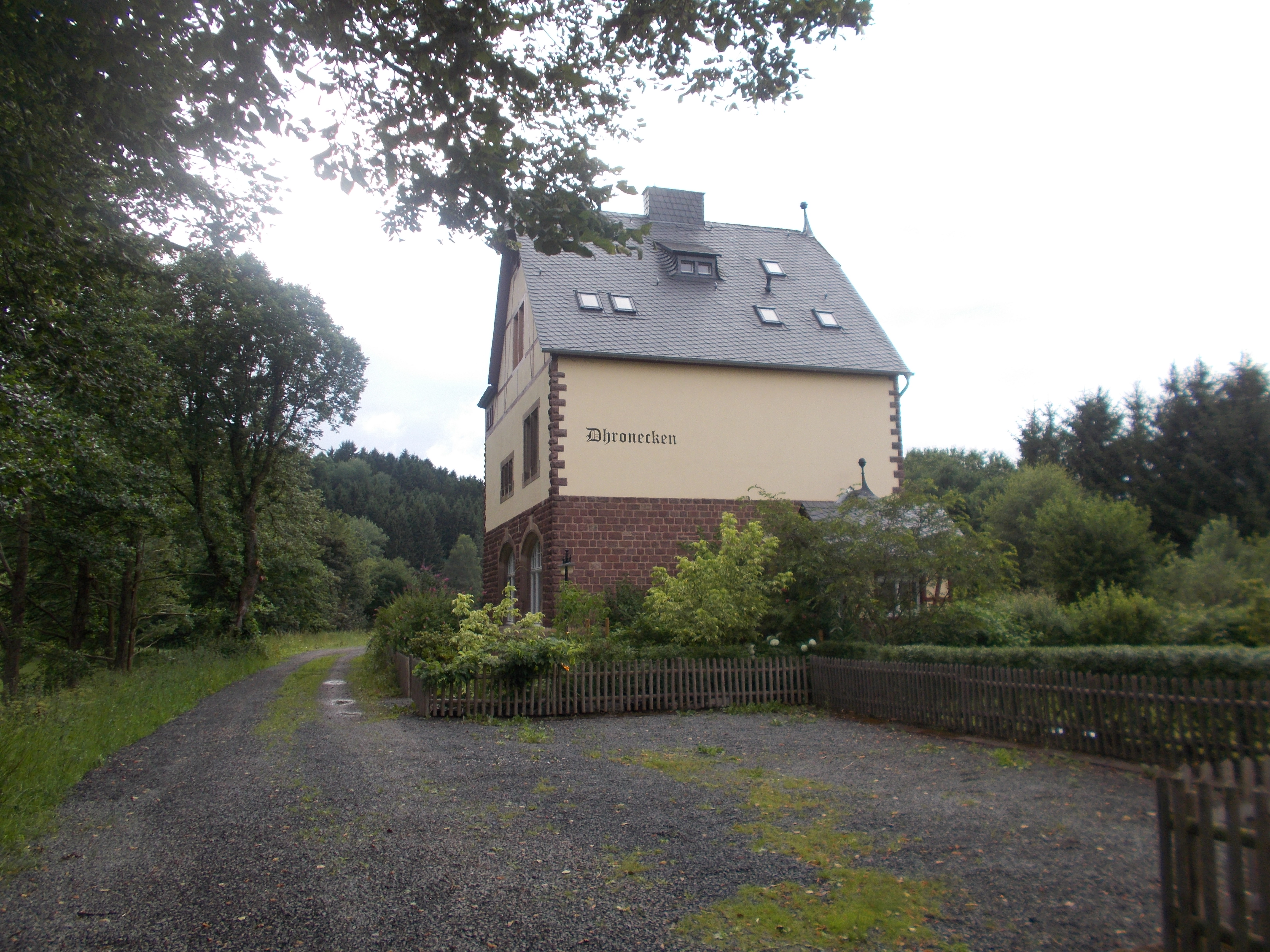 ehemaliger Bahnhof; Empfangsgebäude mit Fachwerkgüterschuppen, Typenbau, zwei kleine, ähnlich gestaltete Nebengebäude, Anfang des 20. Jahrhunderts